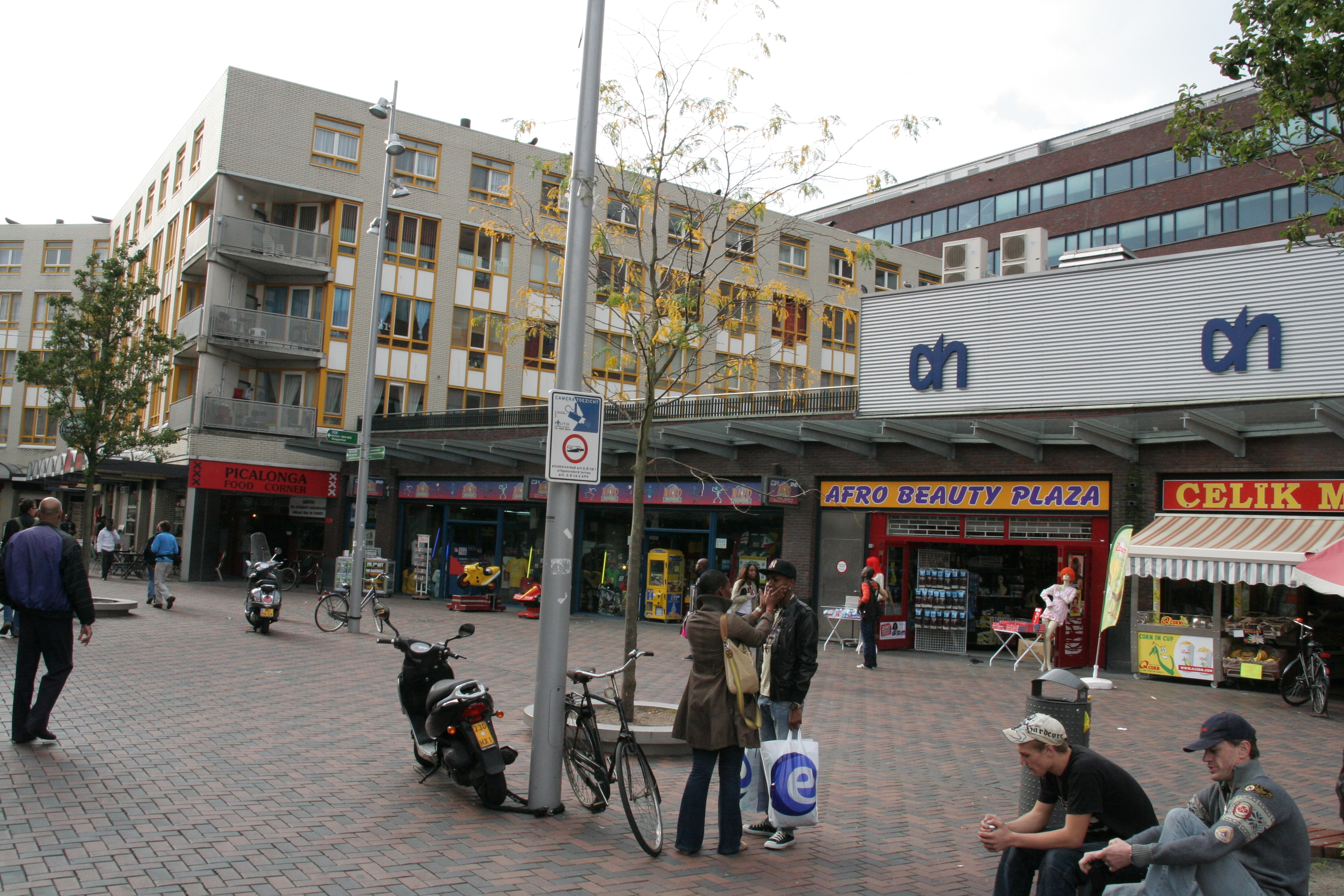 Winkelcentrum Amsterdamse Poort, Amsterdam Zuidoost Bijlmer.